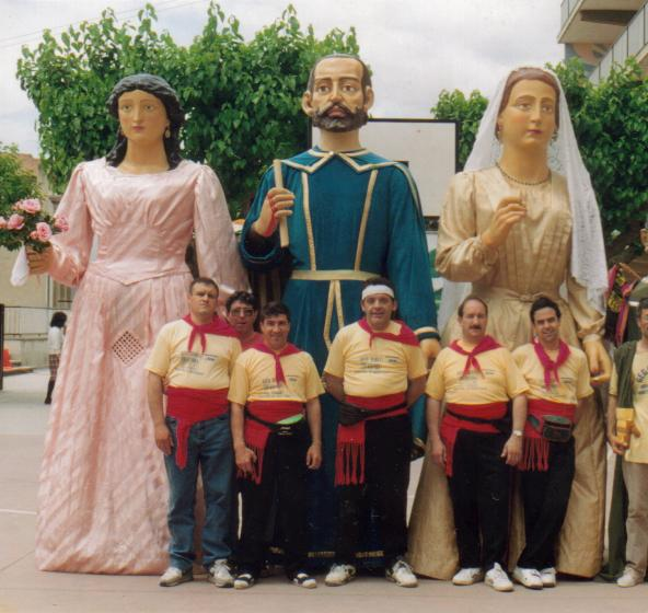 Els Gegants de Viserta i els seus geganters.